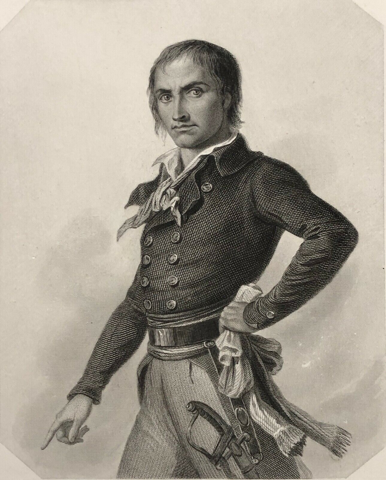 Collot d'Herbois, dessin d'Auguste Raffet gravé par Bosselman. Illustration extraite de Histoire des Girondins de Lamartine, Paris, Furne et Cie-W.Coquebert, 1847.